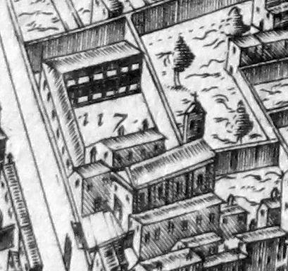 Pianta del buonsignori, dettaglio 117 orbatello